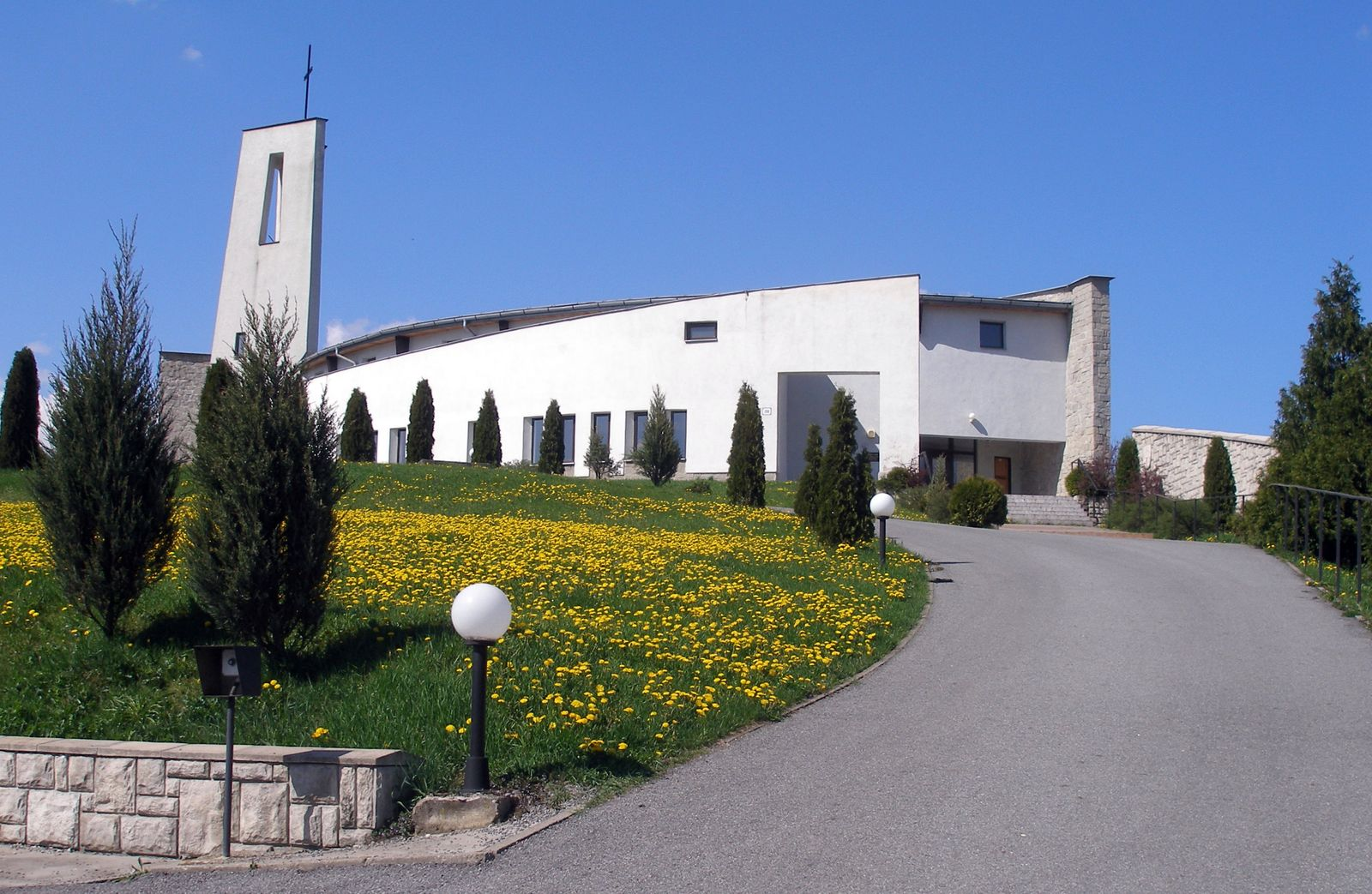 Obec Bzenov a okolie. Okres Prešov, región Šariš.